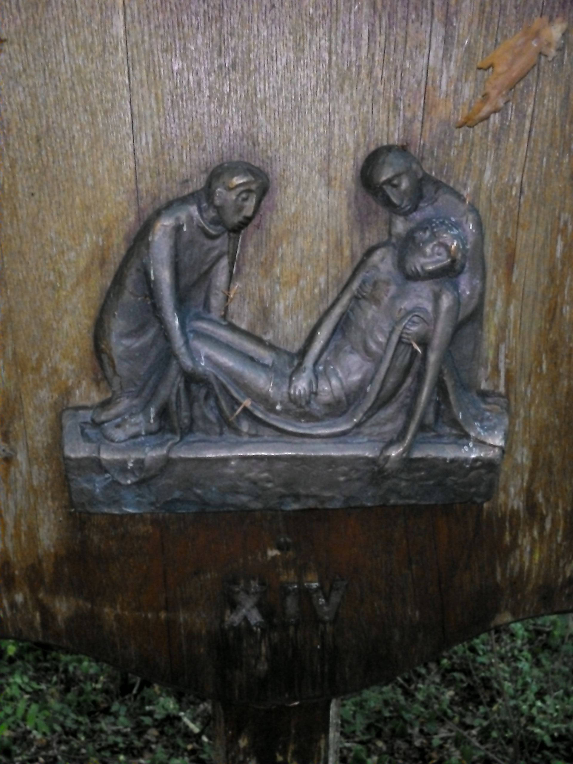 Semberg bei Schwerzen, Gemeinde Wutöschingen, Ringwallburg, Kreuzwerg, Tafel auf dem Gipfelplateau, XIV, Grablegung Jesu.